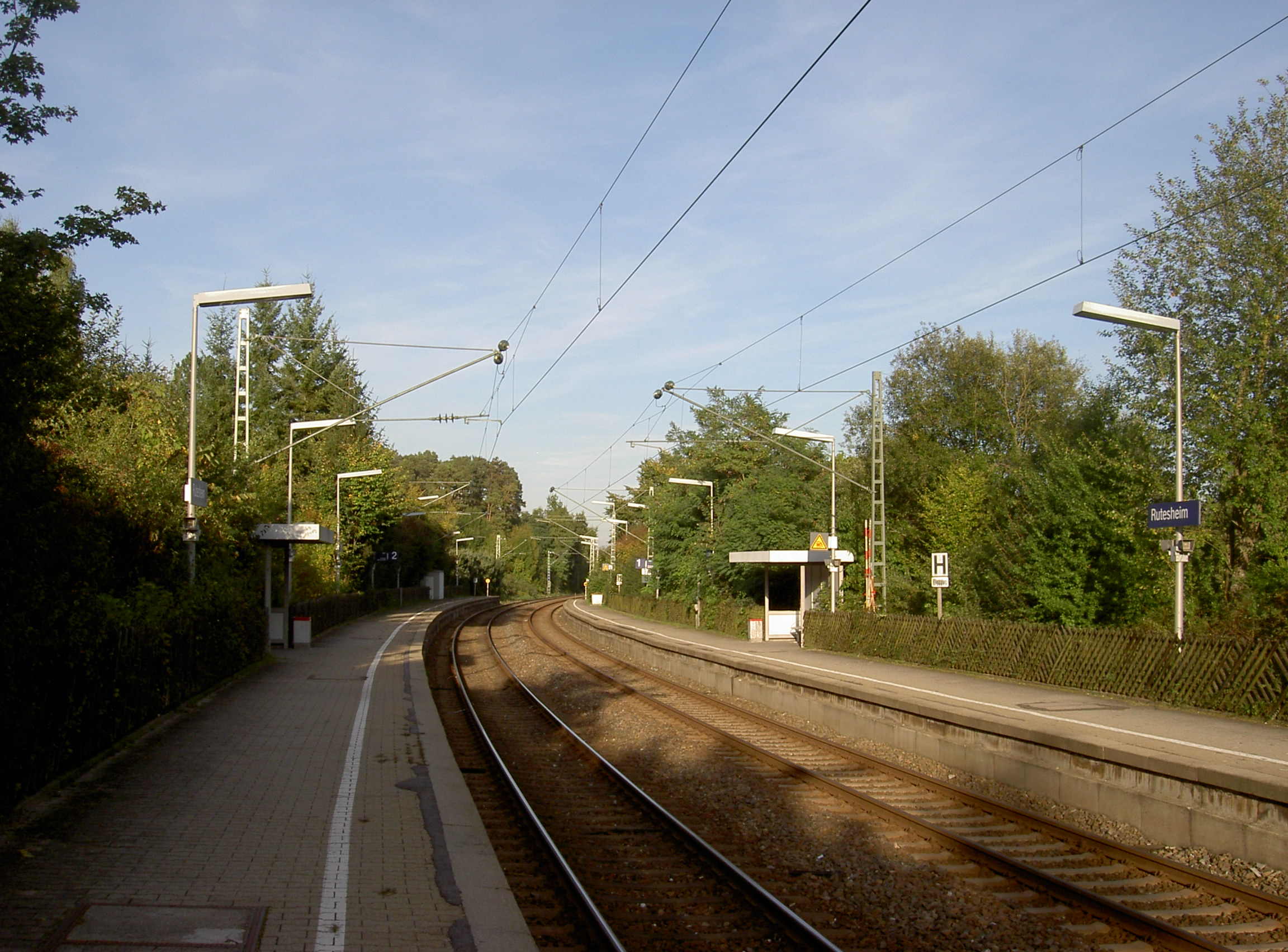 Haltepunkt Rutesheim